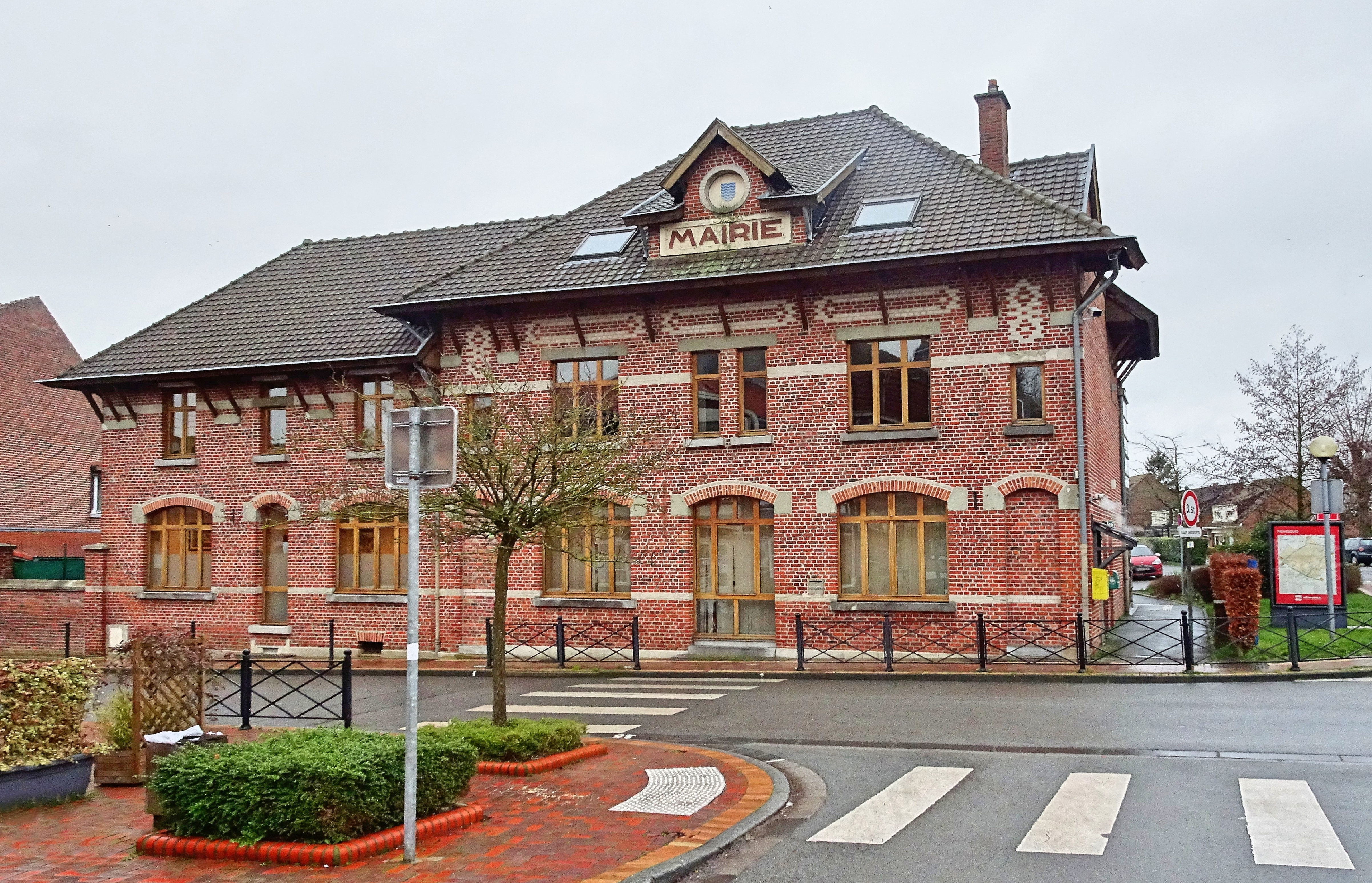 Prémesques (France, dept. Nord), centre du village, la mairie